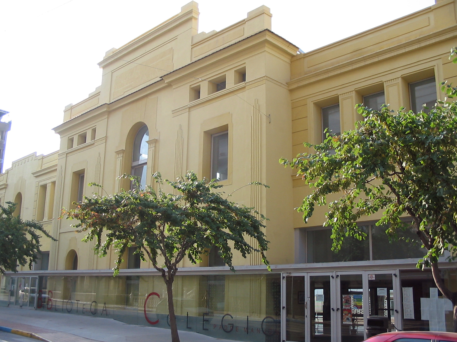 Fotografía de la fachada del Colegio Público Padre Manjón, antigua sede de la Feria Internacional del Calzado e Industrias Afines, de Elda, Alicante, España.